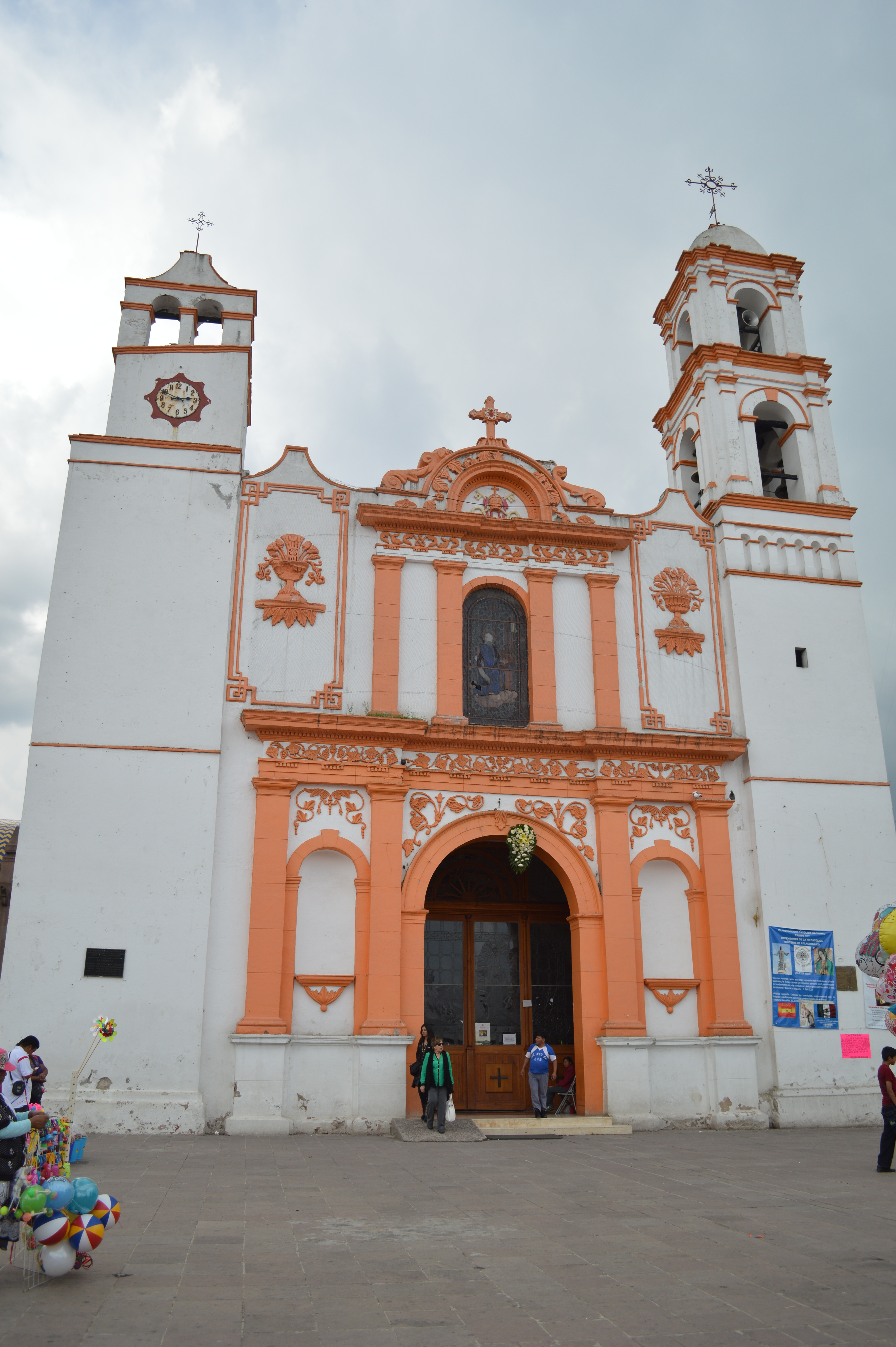 Santa Maria de Guadalupe Parish in Atlacomulco, Mexico State